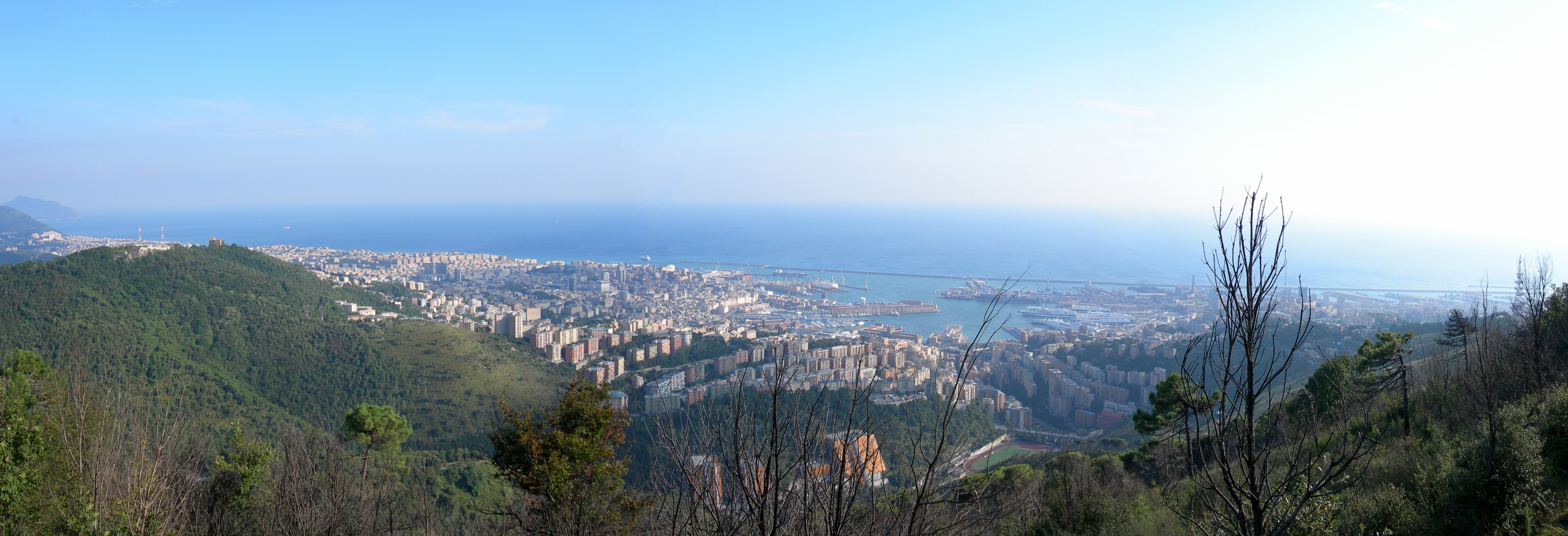 Genova, panorama dalle alture di Righi